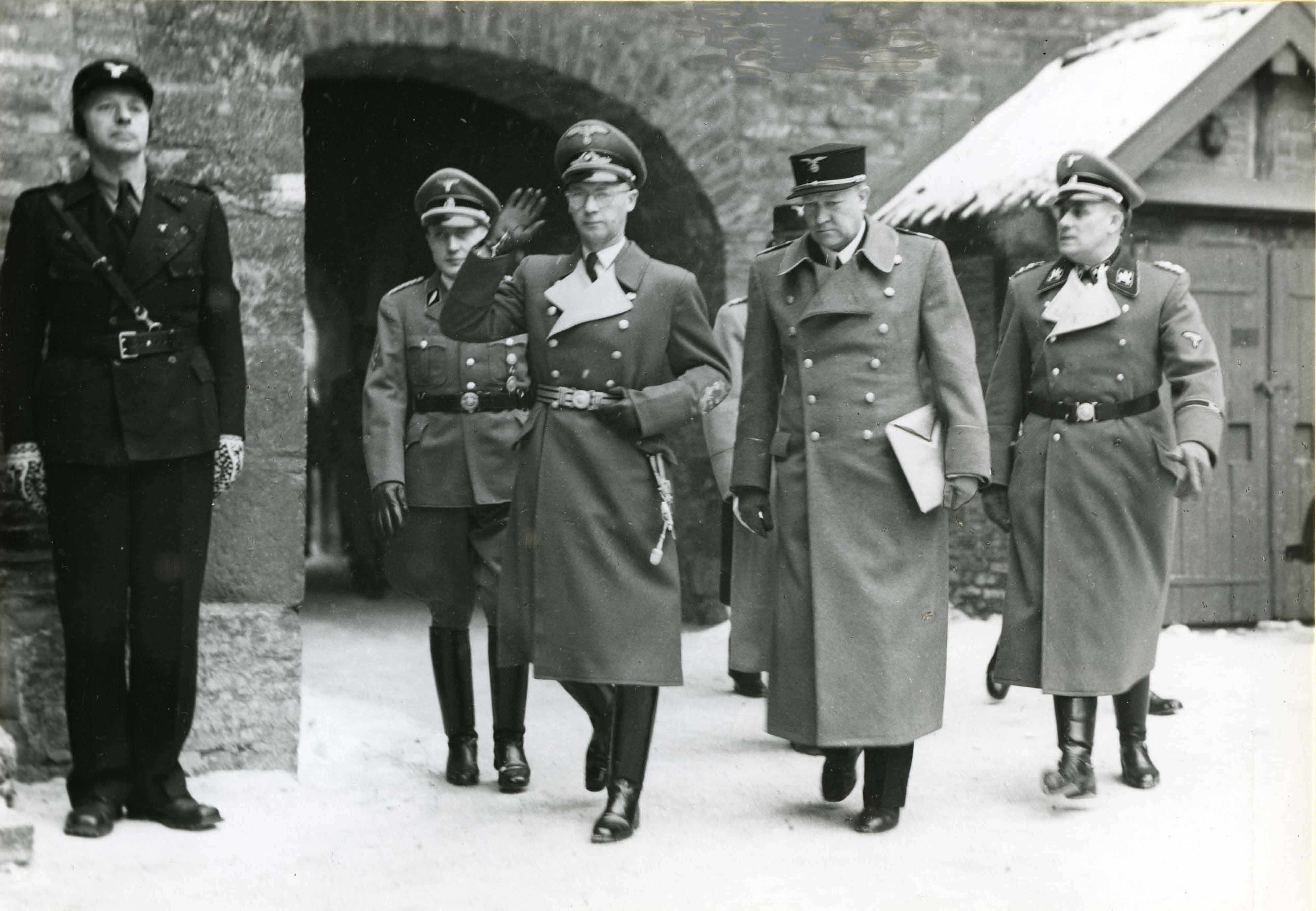 I forbindelse med Statsakten. Fotograf: trolig NTB. Fra album: 1-2-1942. RA/PA-0750/H/0002/ 1019 «Statsakten» var en seremoni på Akershus slott i Oslo under andre verdenskrig 1. februar 1942 da rikskommissar Josef Terboven innsatte Vidkun Quisling, leder for Nasjonal Samling (NS), som «ministerpresident» i Norge, og de tyskkontrollerte kommissariske ministerne ble erstattet av «den nasjonale regjering» utgått fra NS. «Statsakten» markerte at Quisling fikk den formelle makta i Norge, og ved lov av 12. mars 1942 ble NS «statsbærende parti». Quisling hadde håp om at ordninga også skulle gi NS reell makt og føre til fred mellom Norge og Tyskland, men tysk tilsynsforvaltninga gjennom Reichskommissariat Norwegen fortsatte som før inntil frigjøringa 8. mai 1945.